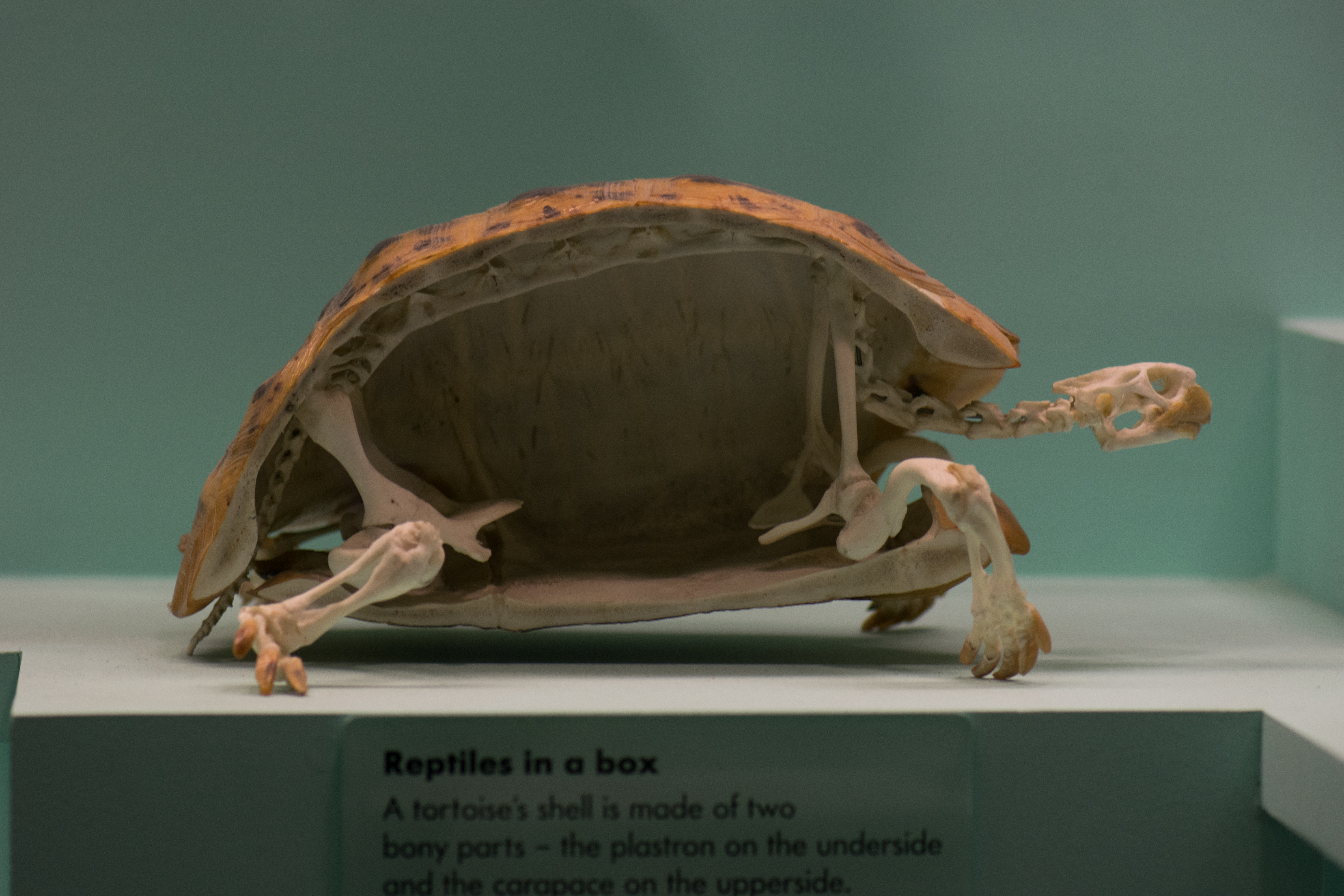 London, 2017